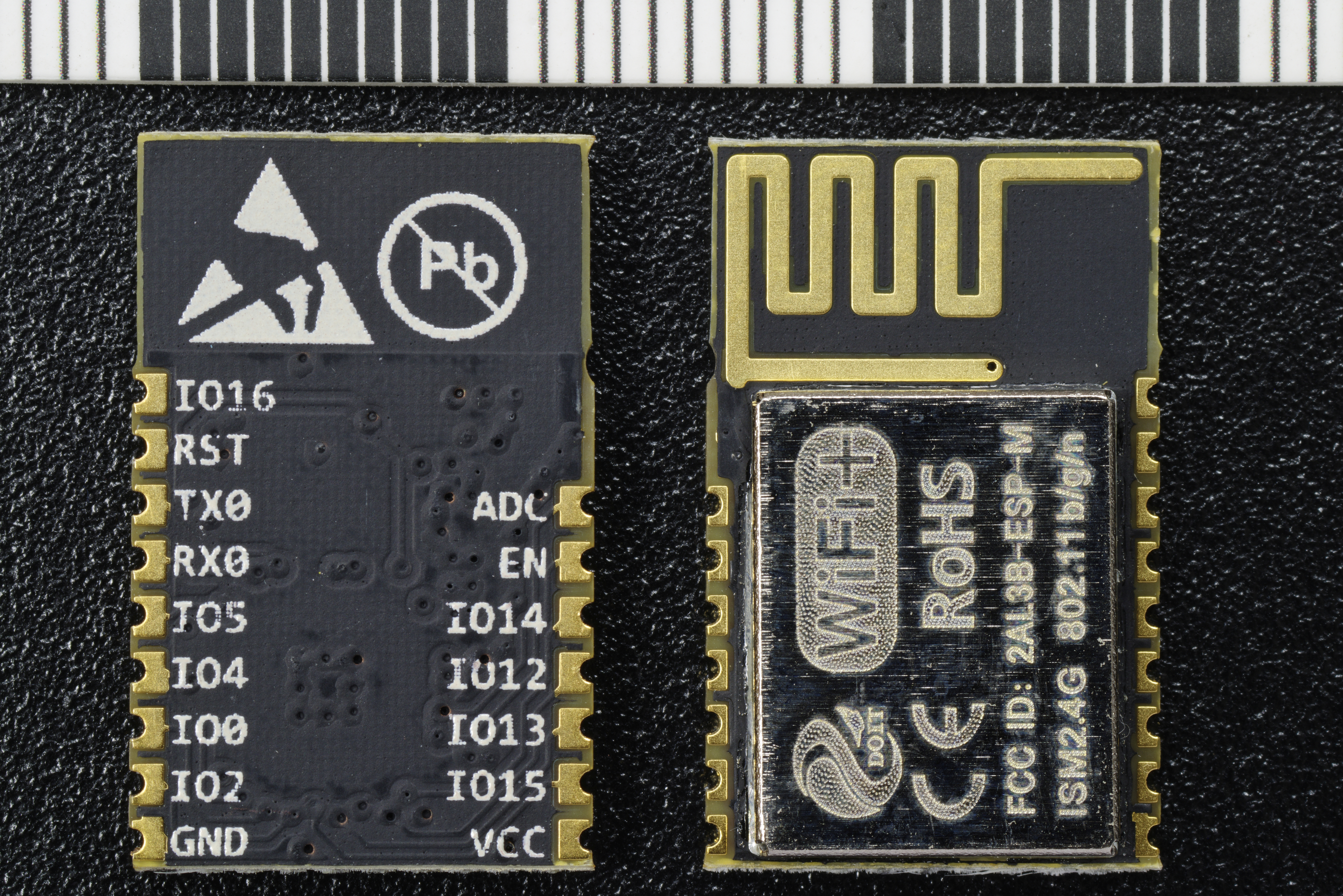 Espressiv IoT Mikrocontrollermodul ESP-M2 mit ESP8285 Chip. Der ESP8285 entspricht einem ESP8266 mit integriertem Flash von 1 Mb und ist für den erweiterten Temperaturbereich von -40°C bis 125°C zugelassen. Das ähnliche Modul ESP-M1 weist statt einer gedruckten Antenne eine Microbuchse für eine externe Antenne auf. Das ESP-M3-Modul wiederum mit gedruckter Antenne ist noch kompakter, hat jedoch weniger herausgeführte Ports. Bildversion mit Millimetermaßstab